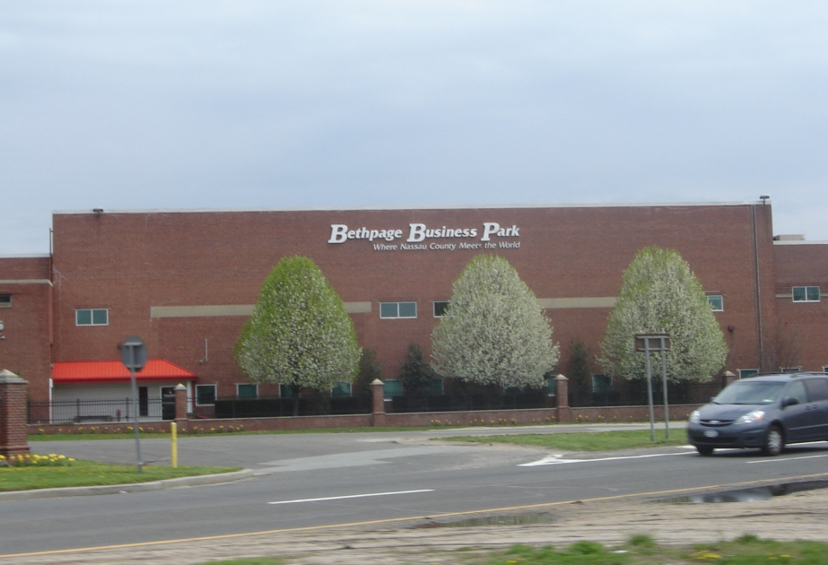 Bethpage Business Park in Bethpage, NY.